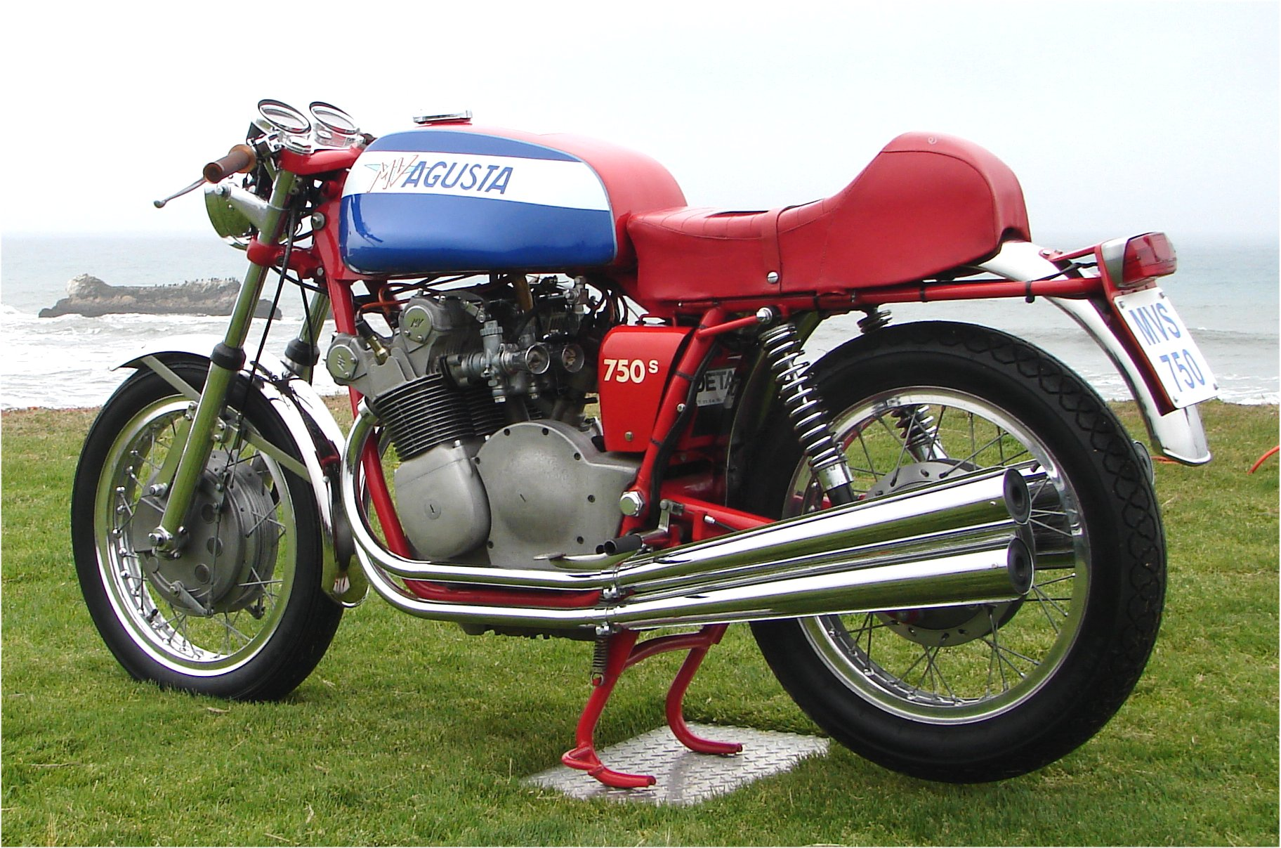 MV Agusta 750 Sport "tamburo" (1970-1973)